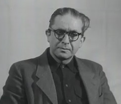 Johannes Karl Bernhard Bobermin, genannt Hanns Bobermin (* 1. Oktober 1903 in Boxhagen; † Februar 1960 in Stuttgart) war ein deutscher Volkswirt, SS-Obersturmbannführer und verurteilter Kriegsverbrecher der Nürnberger Prozesse.